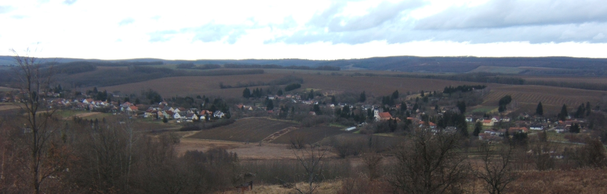 Bánokszentgyörgy látképe